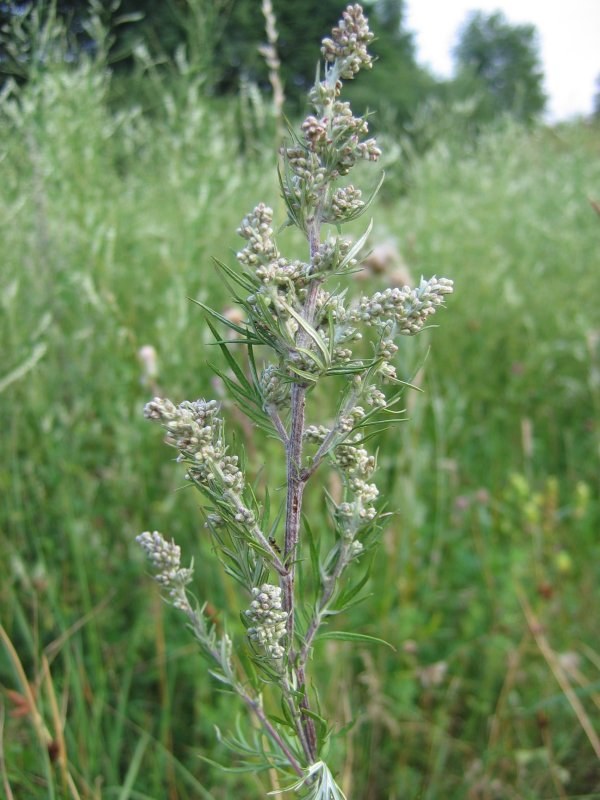 Gewöhnlicher Beifuß (Artemisia vulgaris)